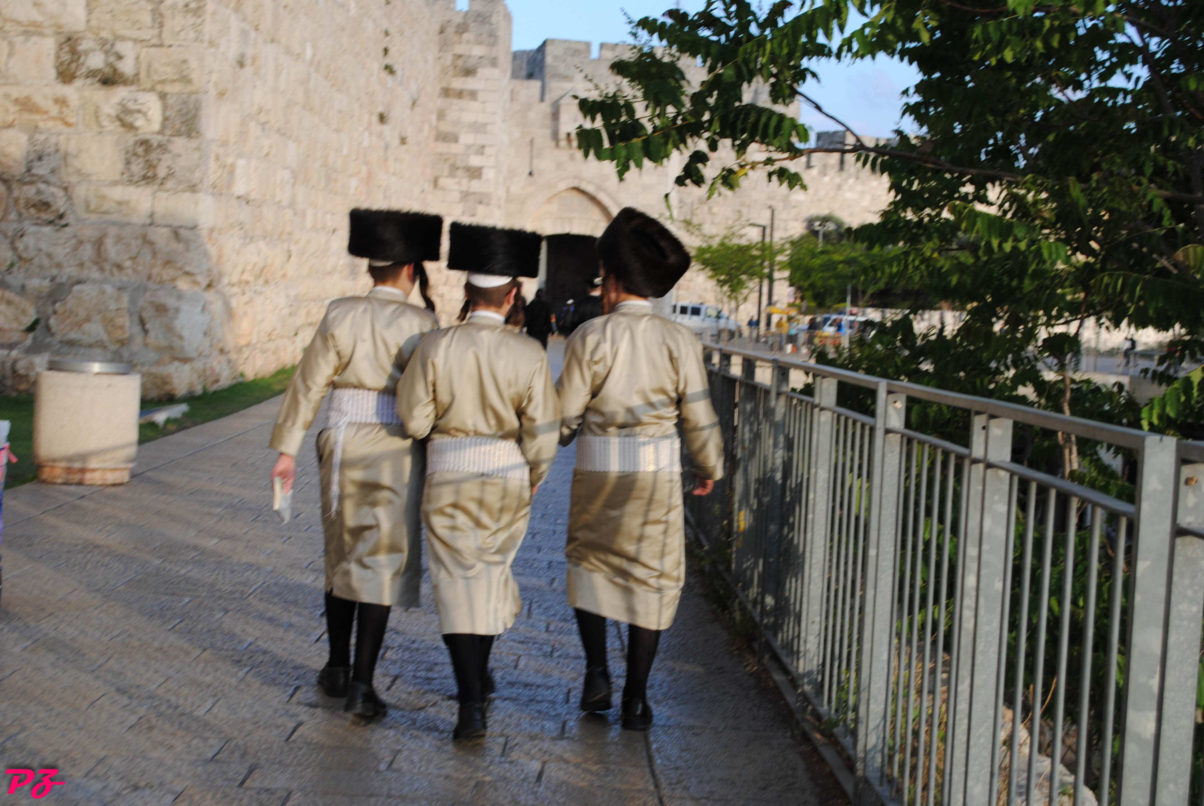 DSC_0828 Jerusalem